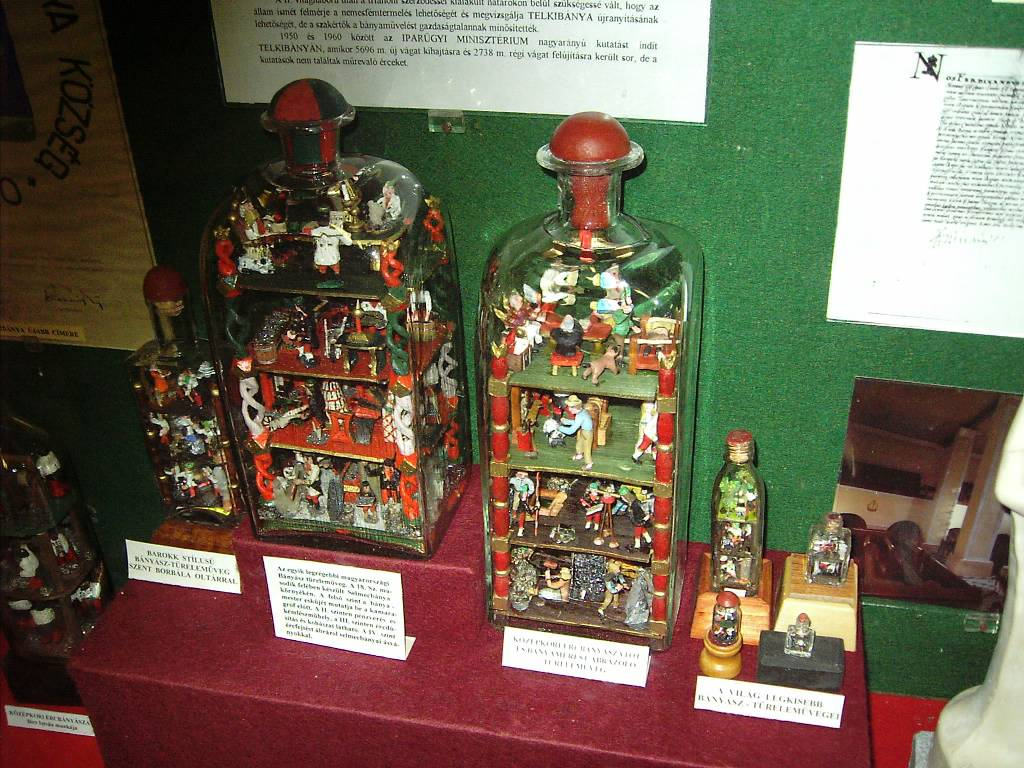 minejo en paciencobotelo